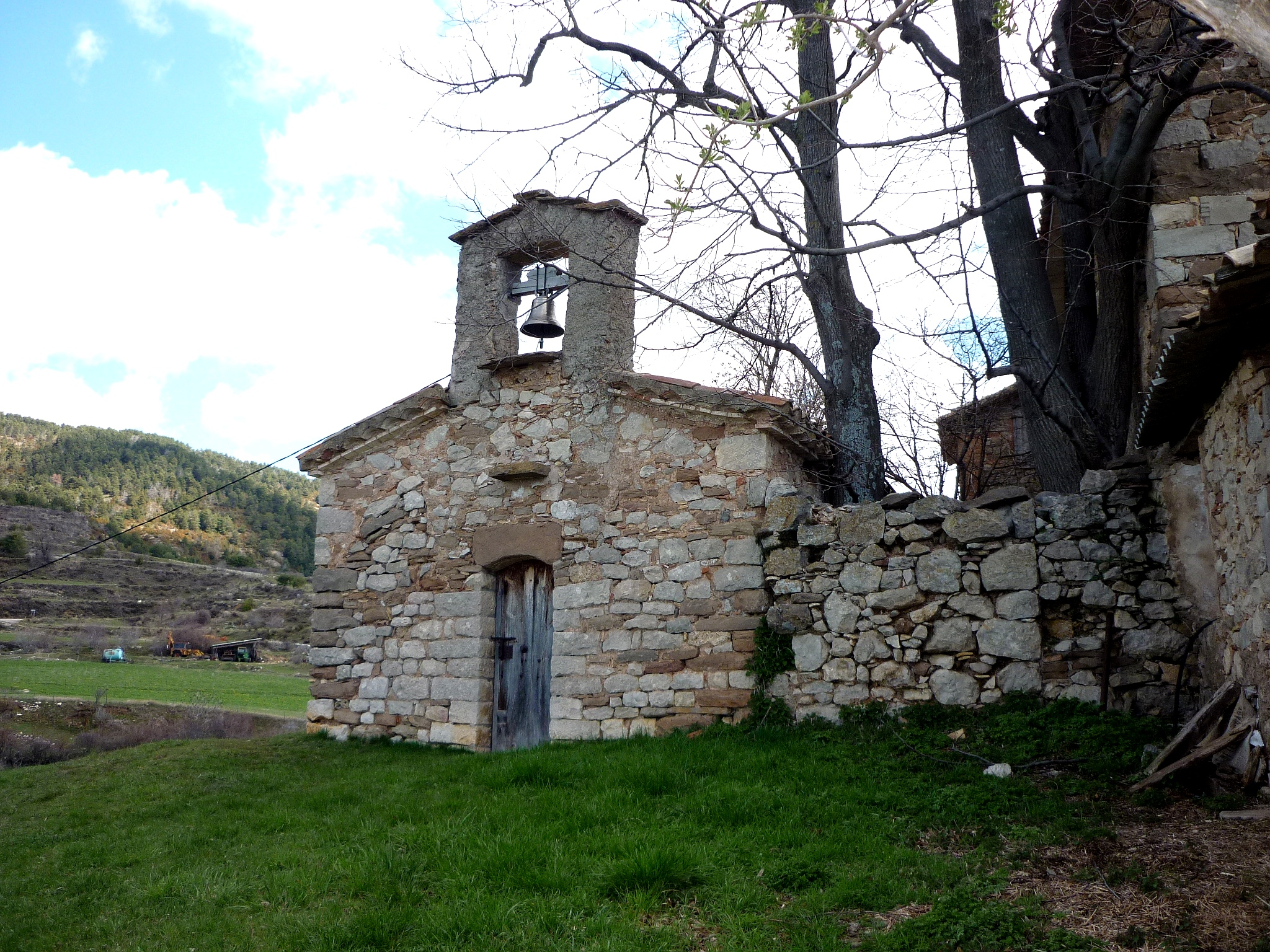 Senzilla façana de la capella de Santa Magdalena del Collell